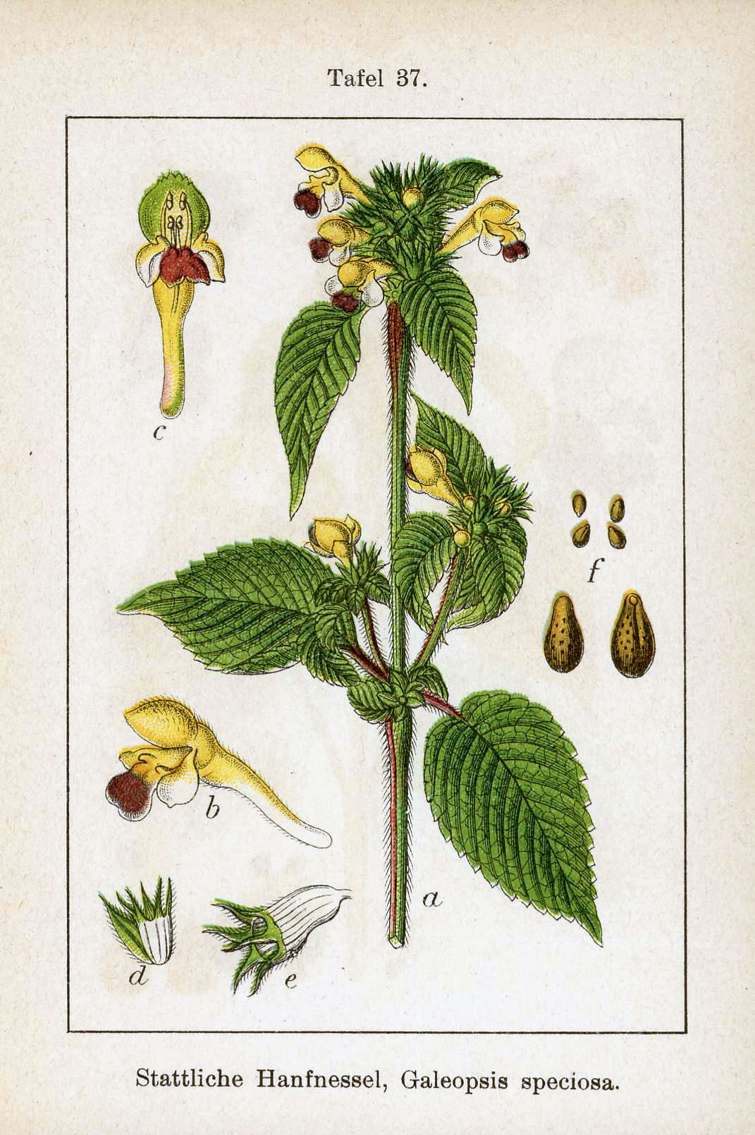 Galeopsis speciosa Mill. Original Caption Stattliche Hanfnessel, Galeopsis speciosa